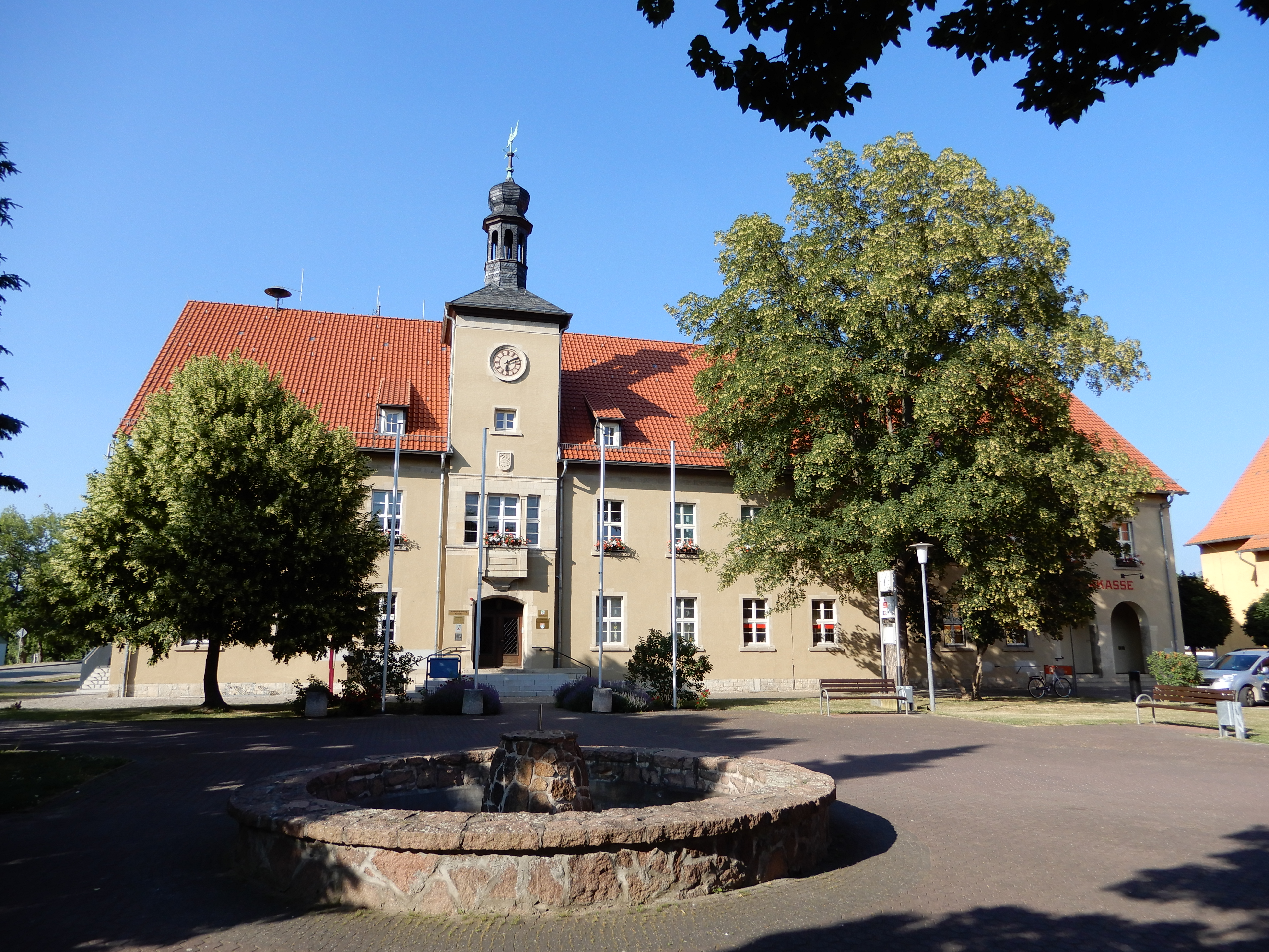 Rathaus Nachterstedt